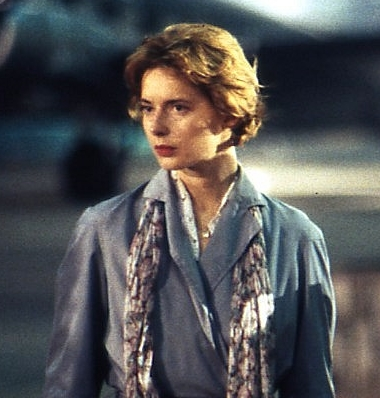 Isabella Rossellini i Berlin 1992